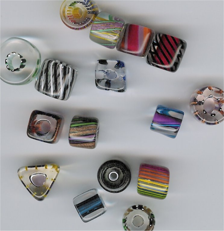 Abalorios de colorines y formas diversas Furnace glass beads, taken by me. User:pschemp 20:17, 28 January 2006 . . Pschemp (Talk) . . 743x763 (81129 bytes) (beads by me)